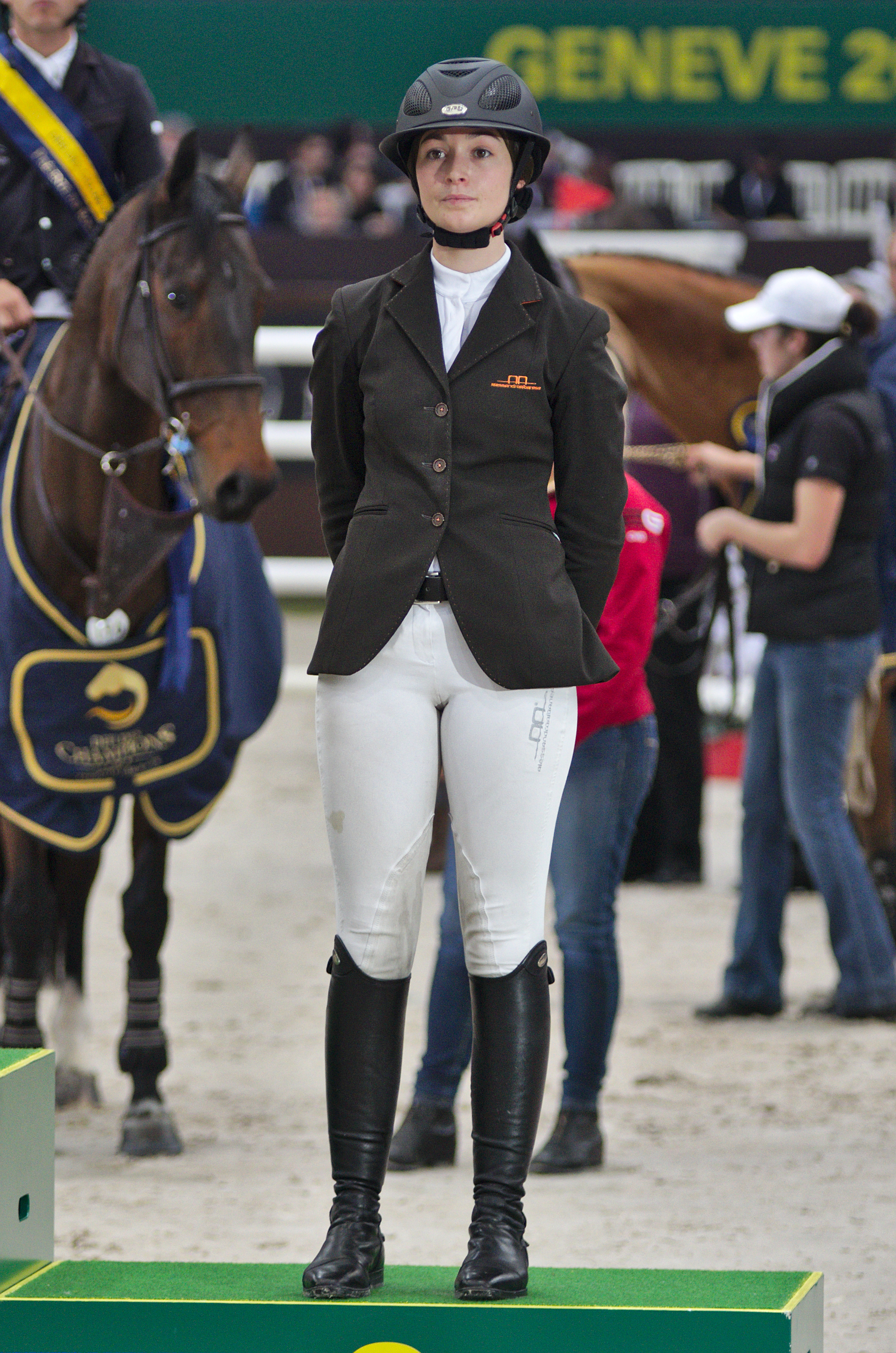 CHI Genève 2013 - 20131214 - Reed Kessler